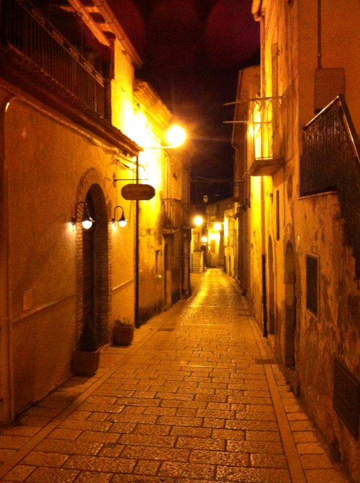 La bellissima Via Carmine nel Centro Storico